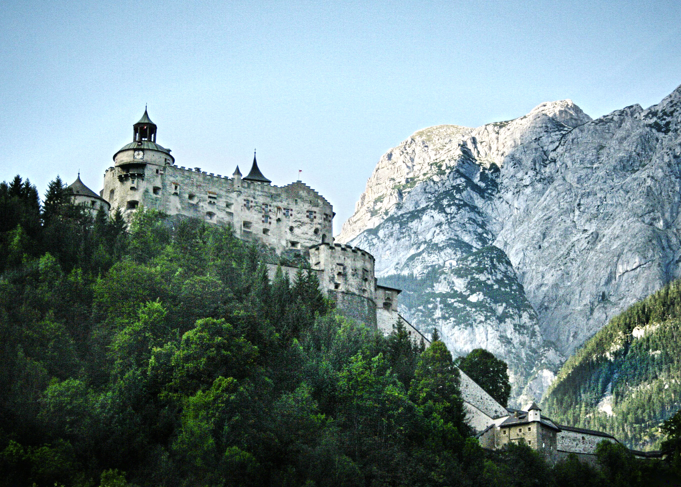 Burg Hohenwerfen